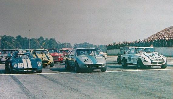 Fotografía recortada de una largada de TC en el Autódromo de Bs. As., donde se puede ver al Steven Ford en la punta.